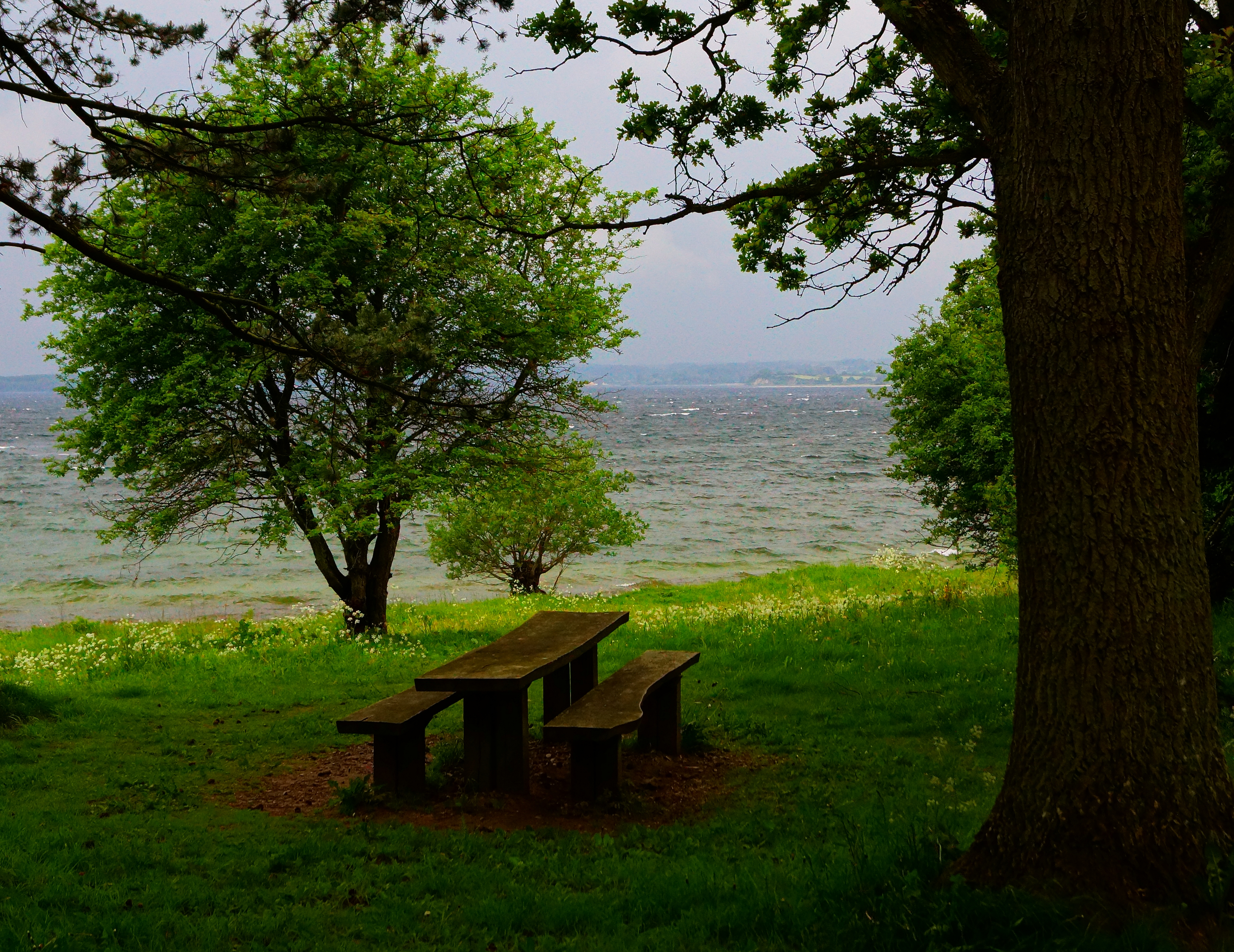 Hestehave, bænk, Følle Bugt